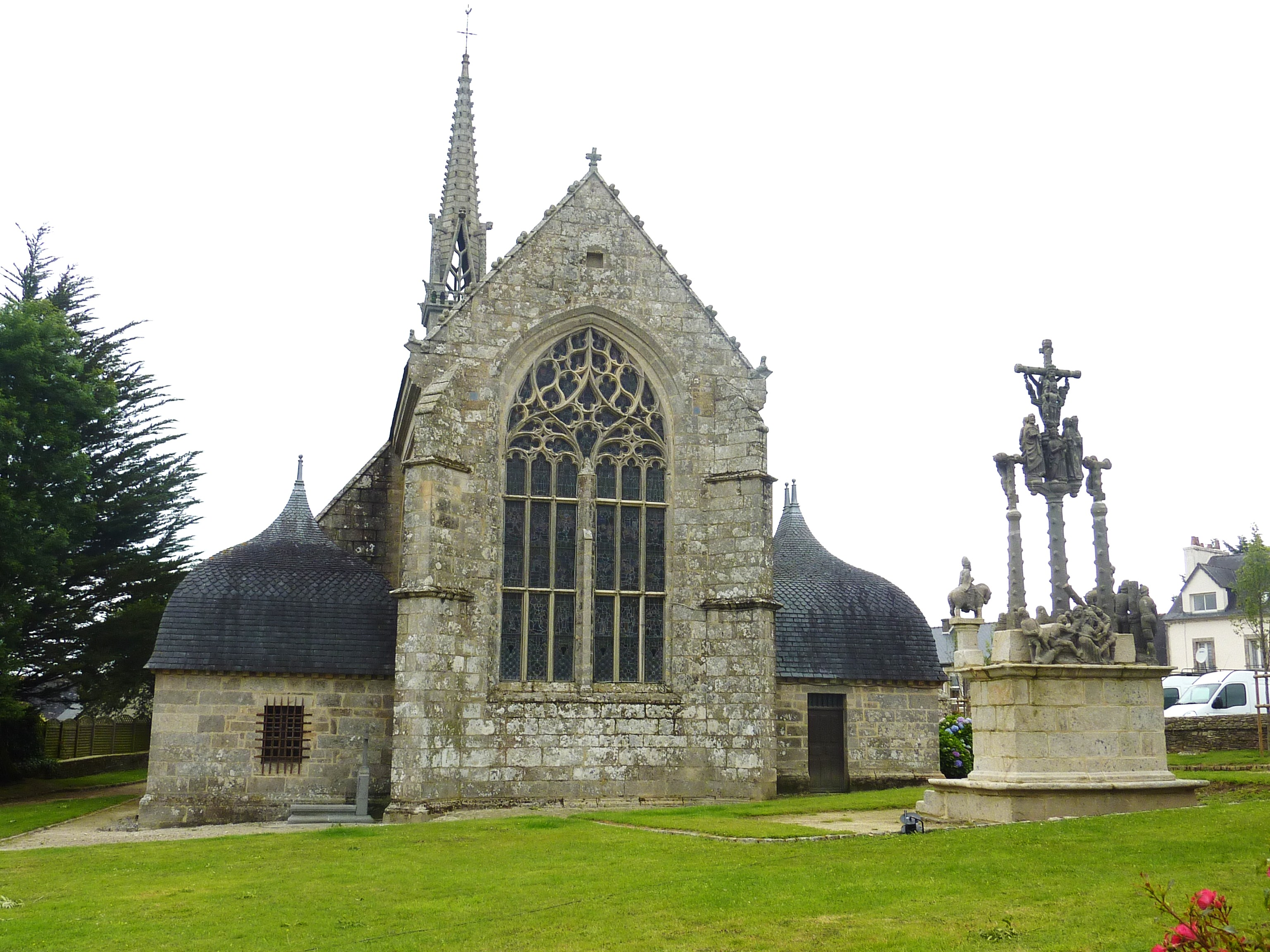 Cléden-poher : l'église paroissiale et le calvaire